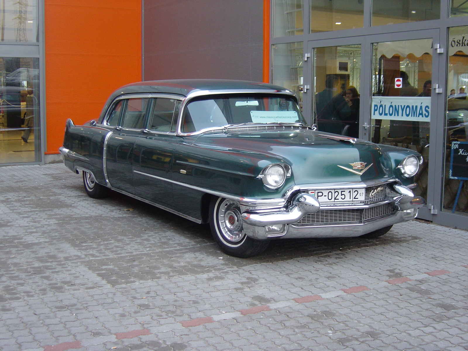 1956 Cadillac